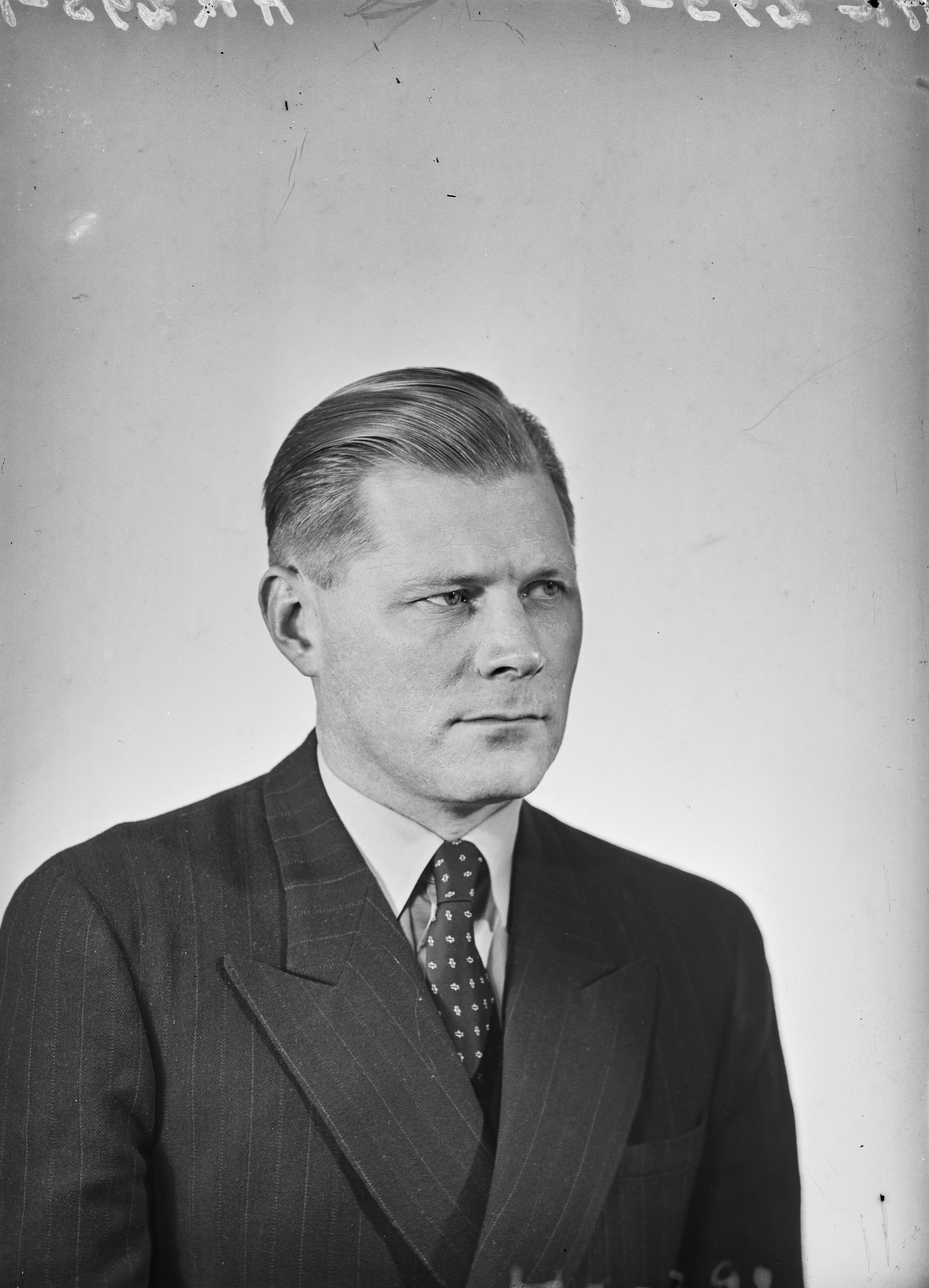 Maalaisliiton kansanedustaja, agronomi Atte Pakkanen